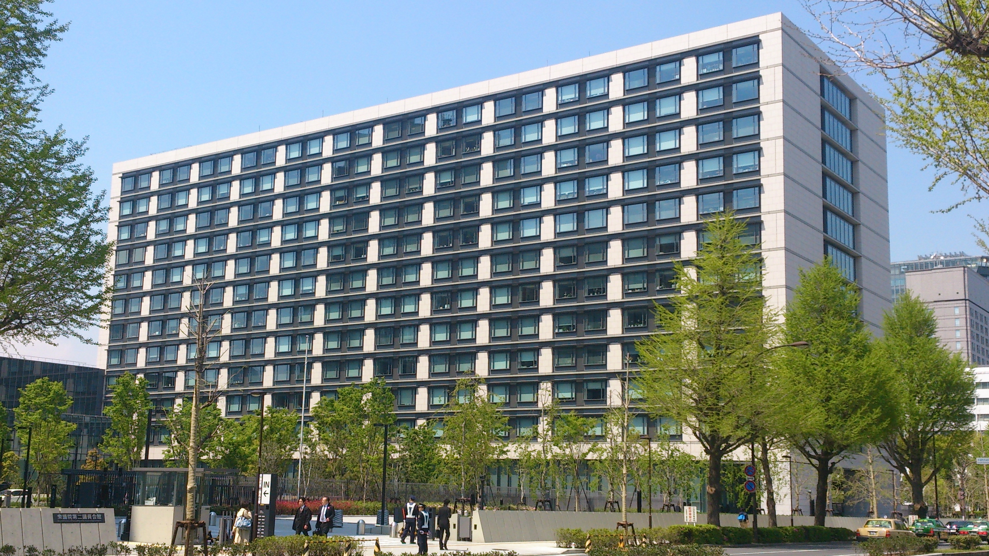 新参議院議員会館の全景。